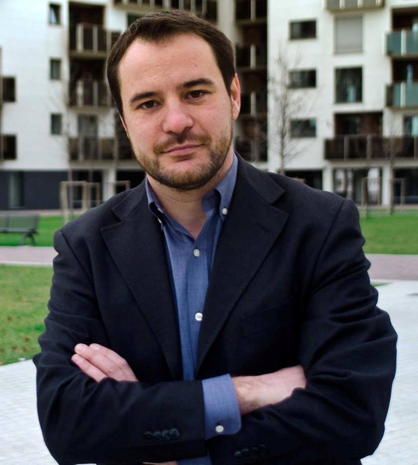 foto Rampi PD